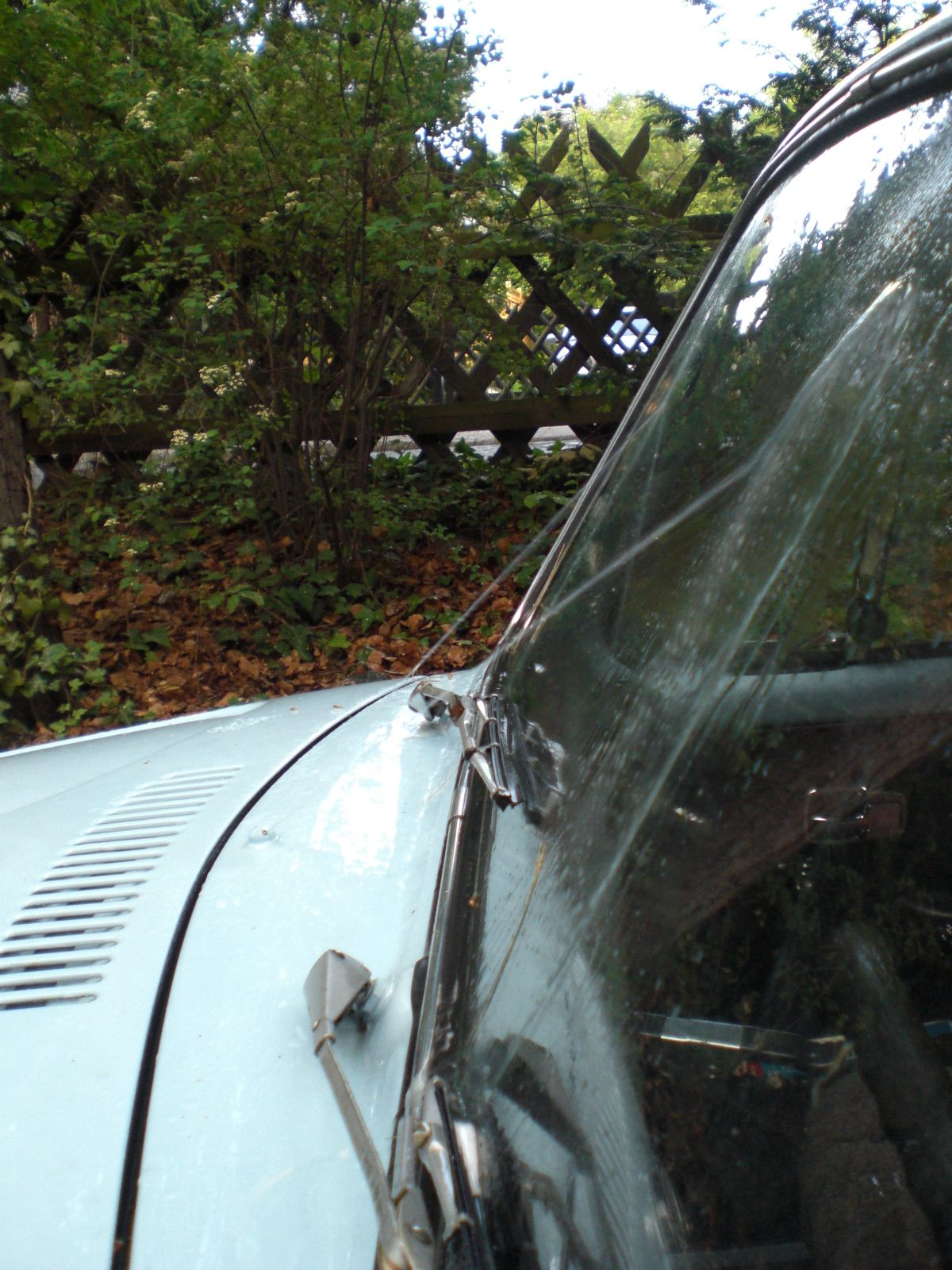 Wischwaschanlage am Automobil in Aktion